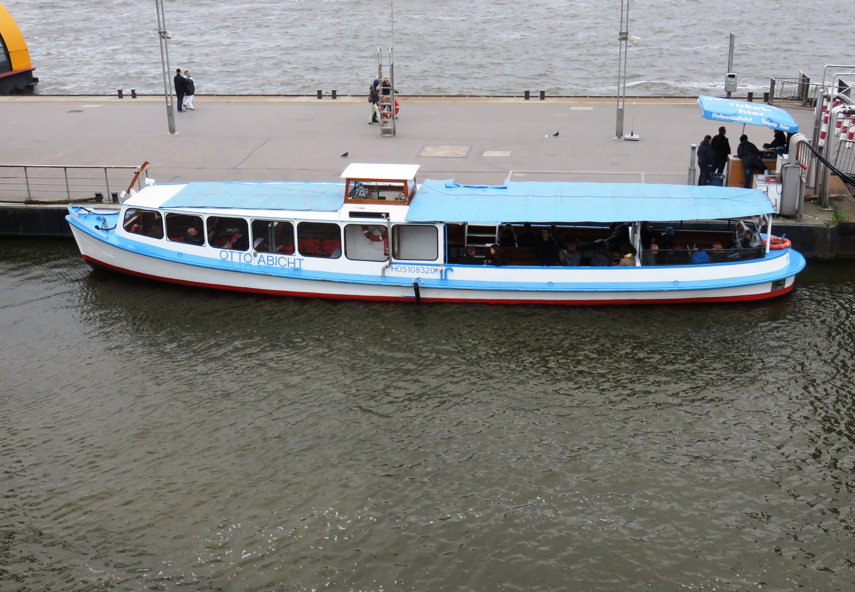 Hamburger Hafenbarkasse Otto Abicht an den St. Pauli-Landungsbrücken